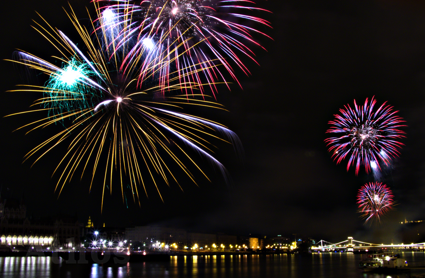 Augusztus 20-ai tűzijáték Budapesten.